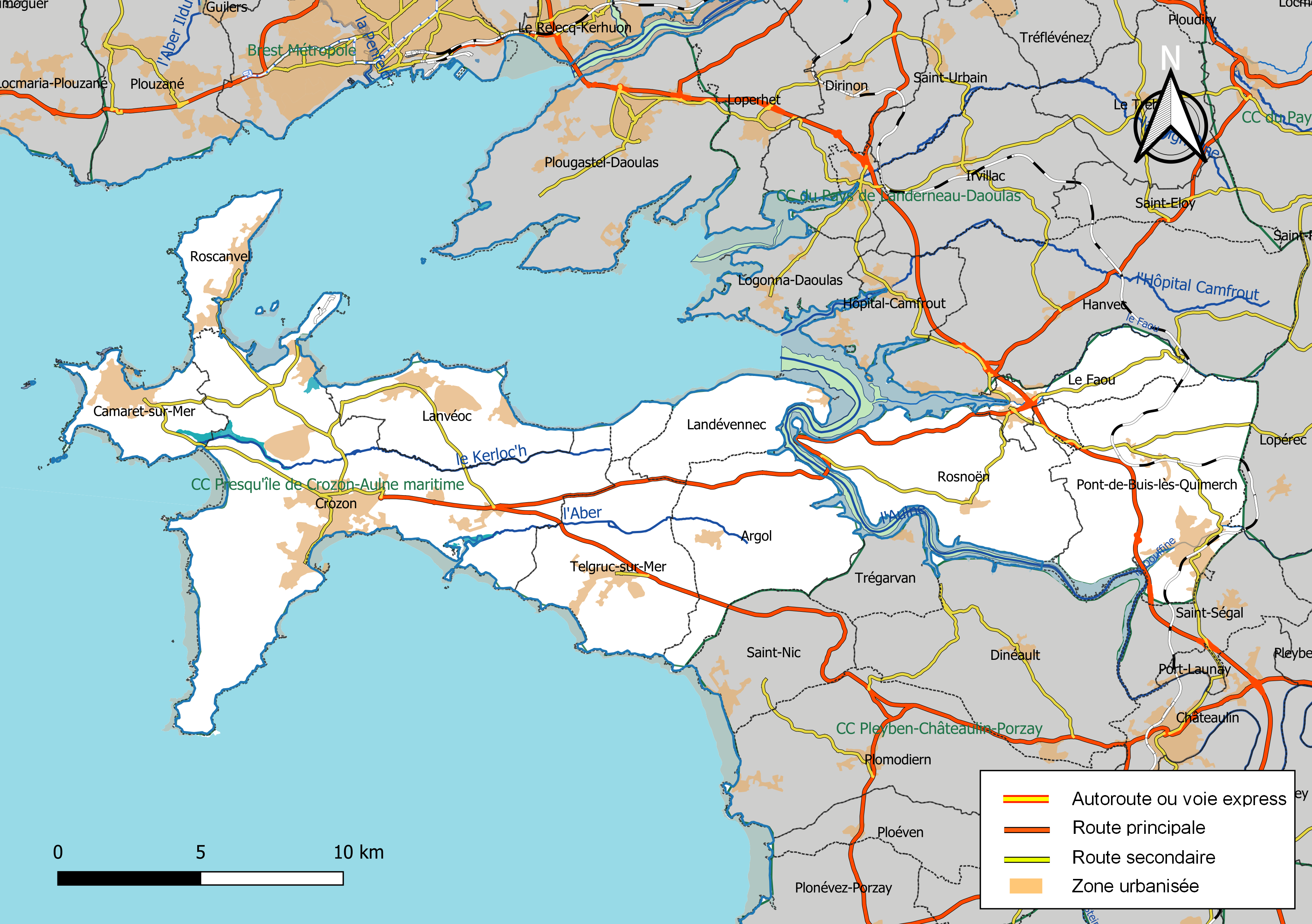 Carte géographique de la Communauté de communes Presqu'île de Crozon-Aulne maritime, département du Finistère, France. Composition au 1er janvier 2019.